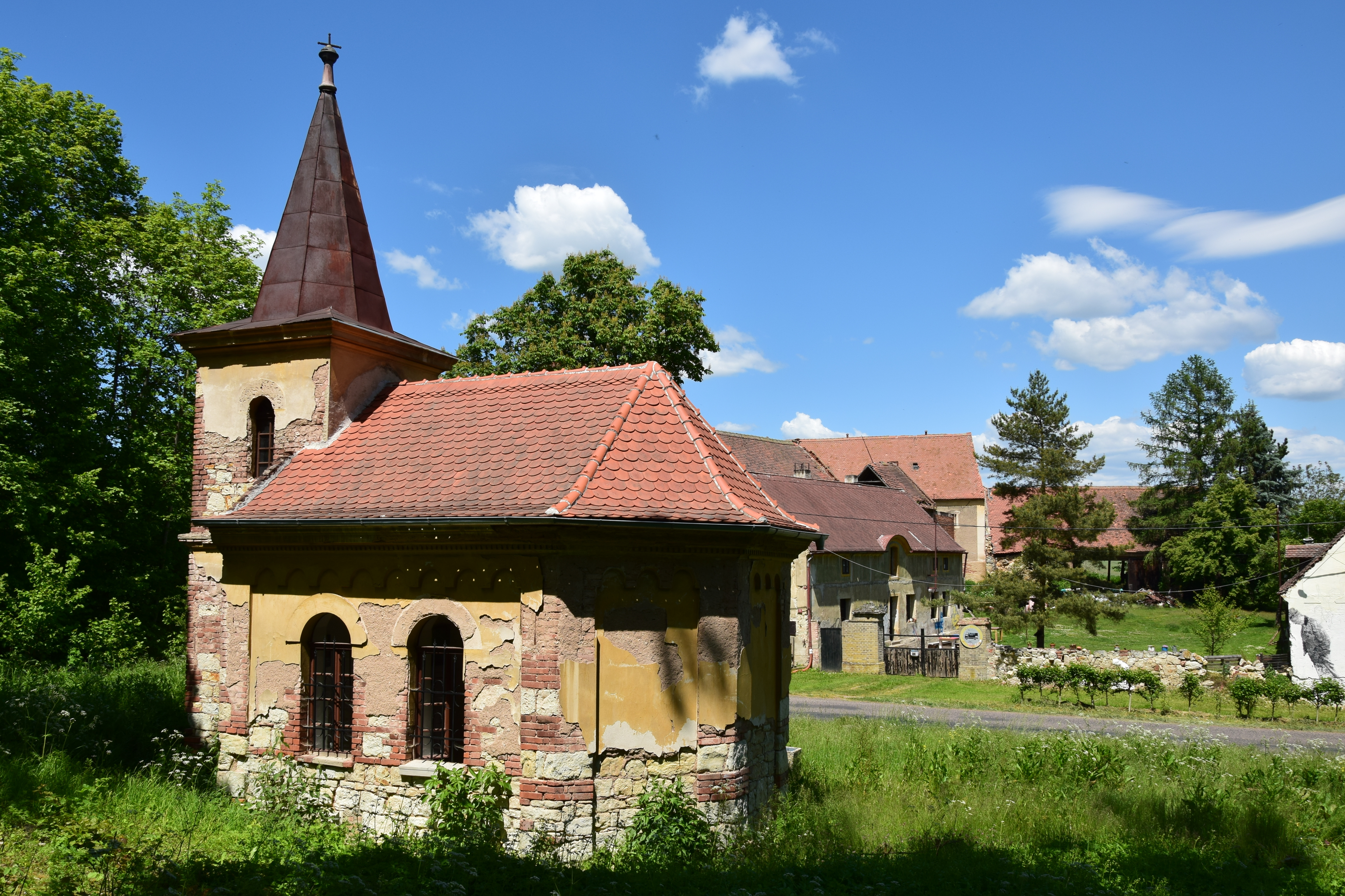 Kaple v zaniklé osadě Čárka (Carka) u Liběšovic